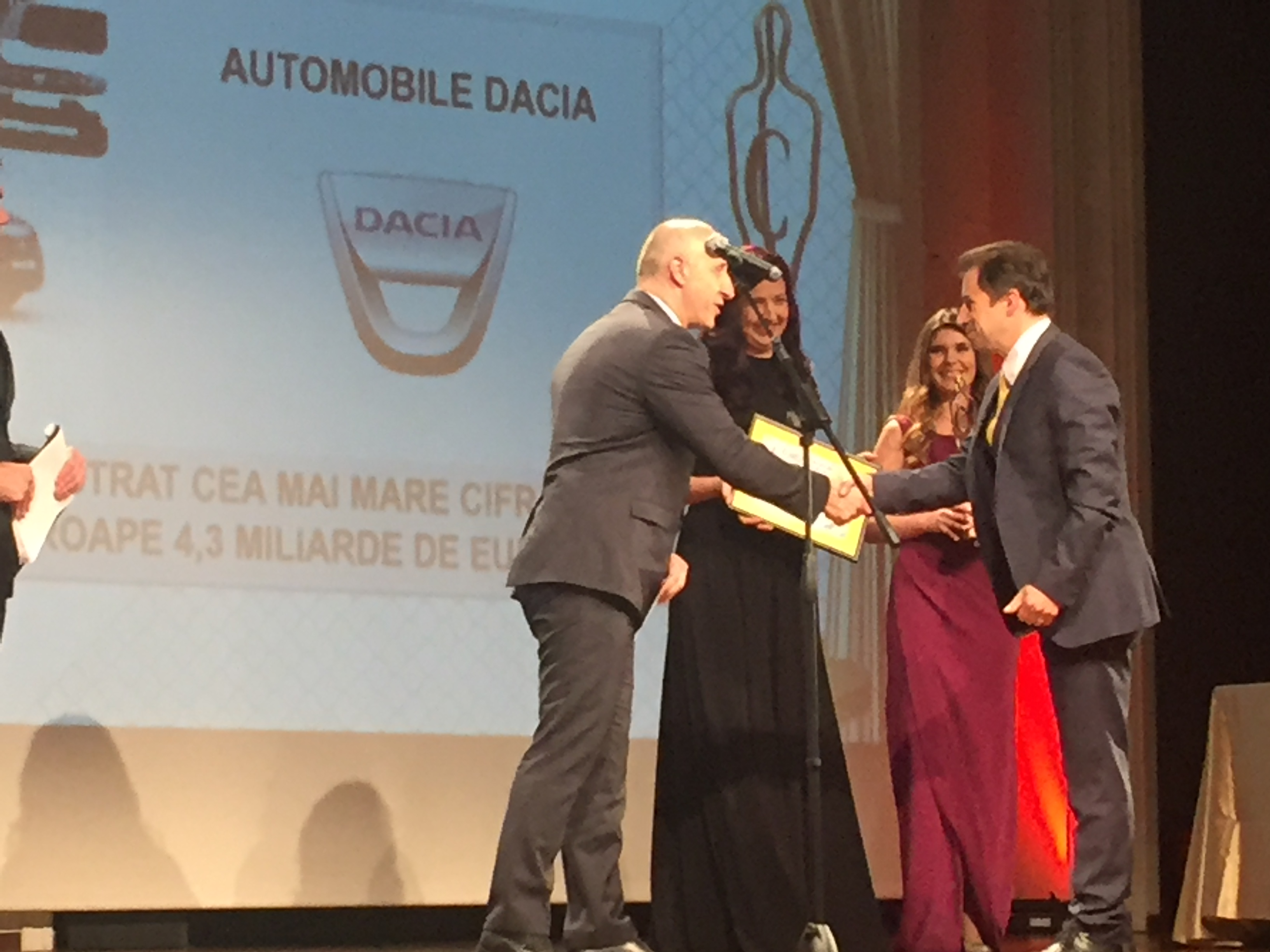 Acordarea titlului de compania anului, uzinelor Dacia, in cadrul galei Capital